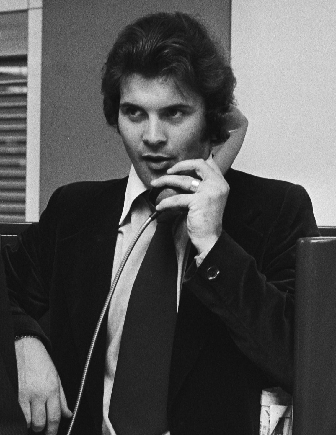 Collectie / Archief : Fotocollectie Anefo Reportage / Serie : [ onbekend ] Beschrijving : Aankomst Glasgow Rangers op Schiphol, tegenstander PSV; nr. 3 v.l.n.r. de spelers, Gordon Smith, Johnstone en Miller (kop) Datum : 30 oktober 1978 Locatie : Noord-Holland, Schiphol Trefwoorden : sport, voetbal Persoonsnaam : Glasgow Rangers, Johnstone Instellingsnaam : PSV Fotograaf : Croes, Rob C. / Anefo Auteursrechthebbende : Nationaal Archief Materiaalsoort : Negatief (zwart/wit) Nummer archiefinventaris : bekijk toegang 2.24.01.05 Bestanddeelnummer : 929-9700